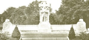 Cmentarz katolicko ewangelicki przy ul. Opawskiej - pomnik poległym podcza I wojny światowej